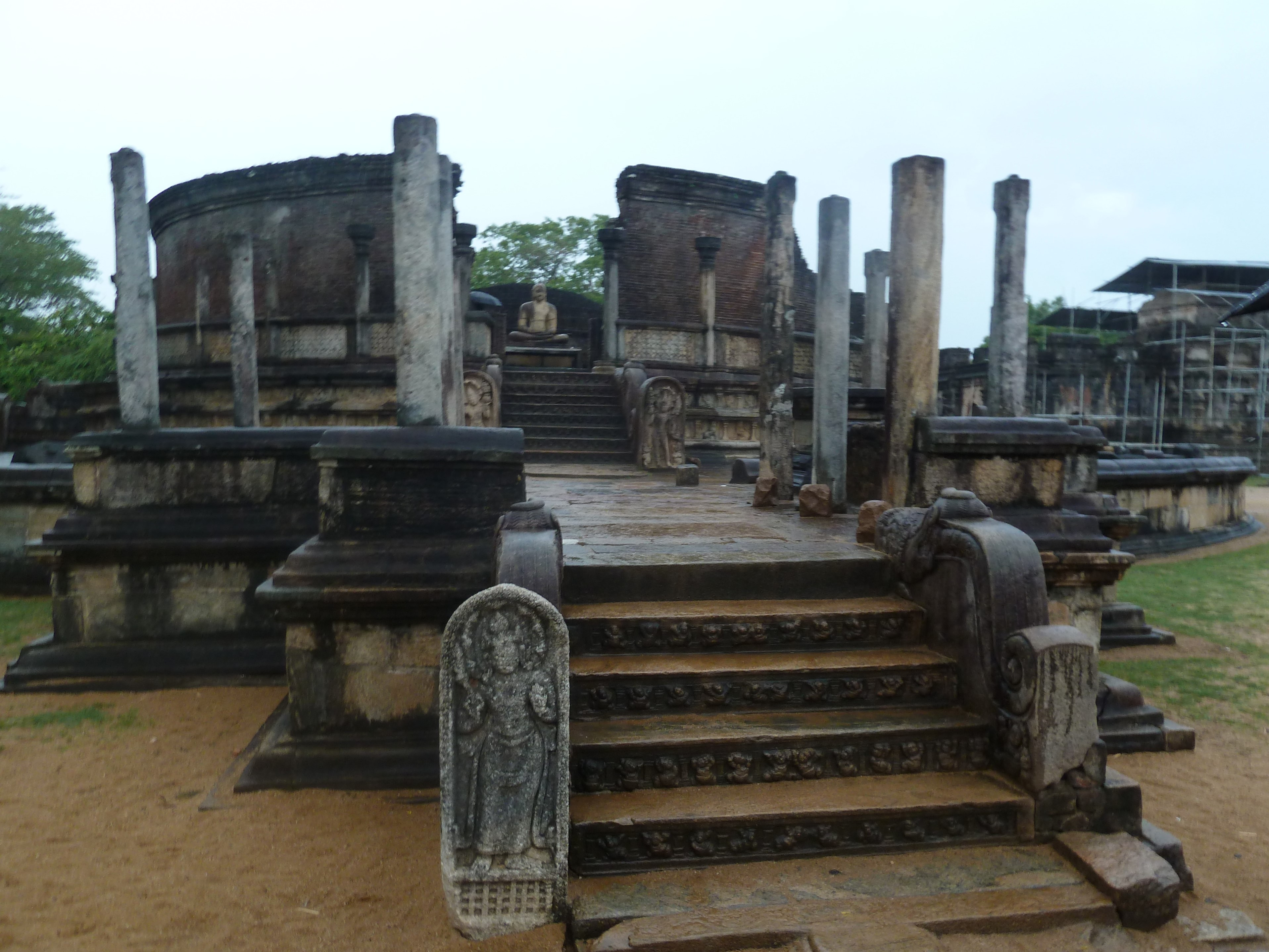 Le palais du roi dans l' ancien royaume de Polonnaruwa, Polonnaruwa Vatadage Sri Lanka.- Asie du Sud